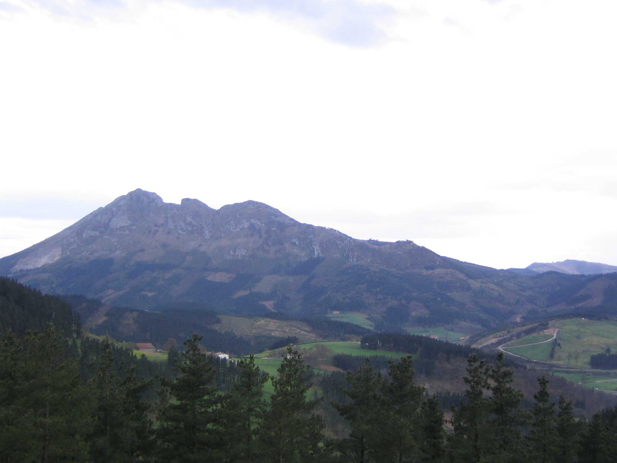 Vista del monte Udalaitz, Vizcaya, País Vasco, España.